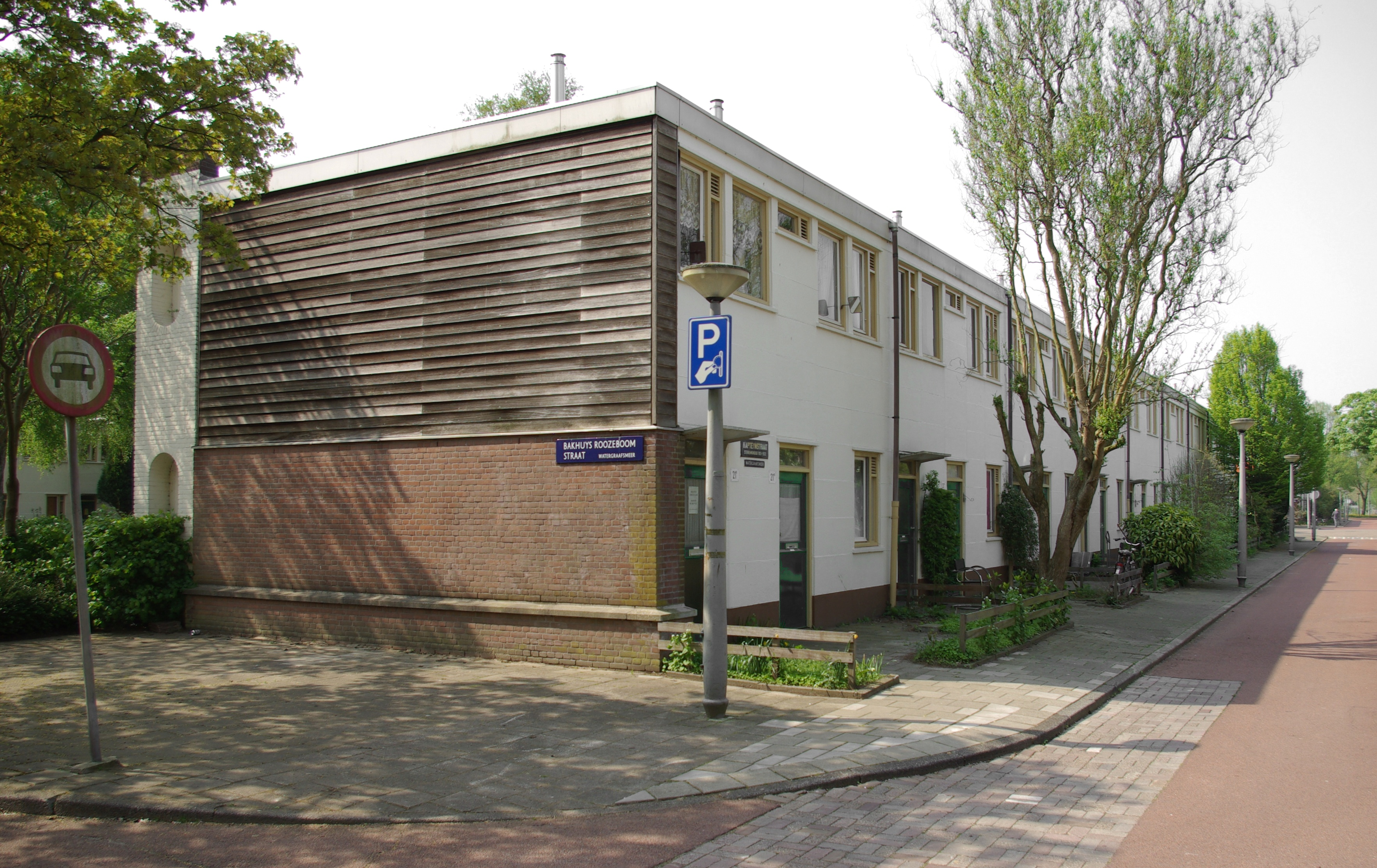 De wijk Jeruzalem in Amsterdam-Oost. De stedenbouwkundigen en architecten Cornelis van Eesteren, J.H. Mulder, B. Merkelbach, Ch.J.F. Karsten, Piet Elling en M. Stam zijn de ontwerpers. De woningen zijn gebouwd tussen 1950 en 1954. Na voordracht in 2007 via de lijst van rijksmonumenten uit de periode 1940-1958, opgesteld door Ronald Plasterk, werd de wijk Frankendaal/Jeruzalem erkend als rijksmonument.